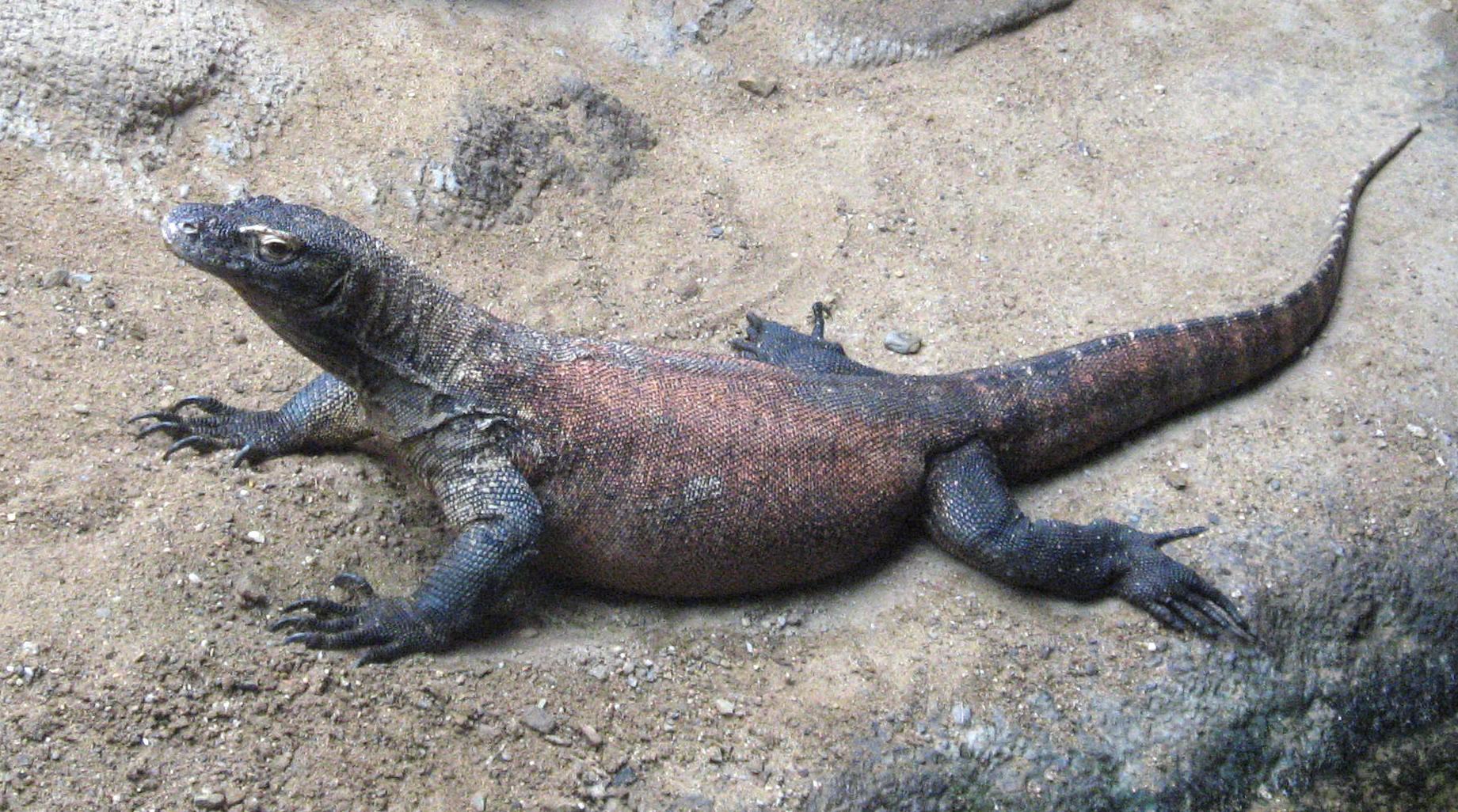 Varanus komodoensis